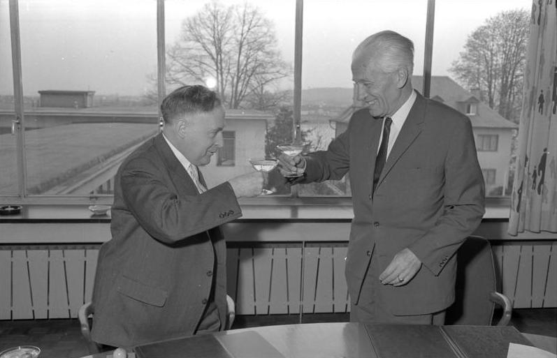 Unterzeichnung eines deutsch-irischen Handelsabkommens im Auswärtigen Amt